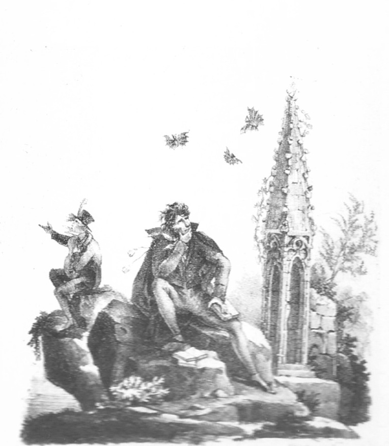 Le Romantique, lithographie satirique